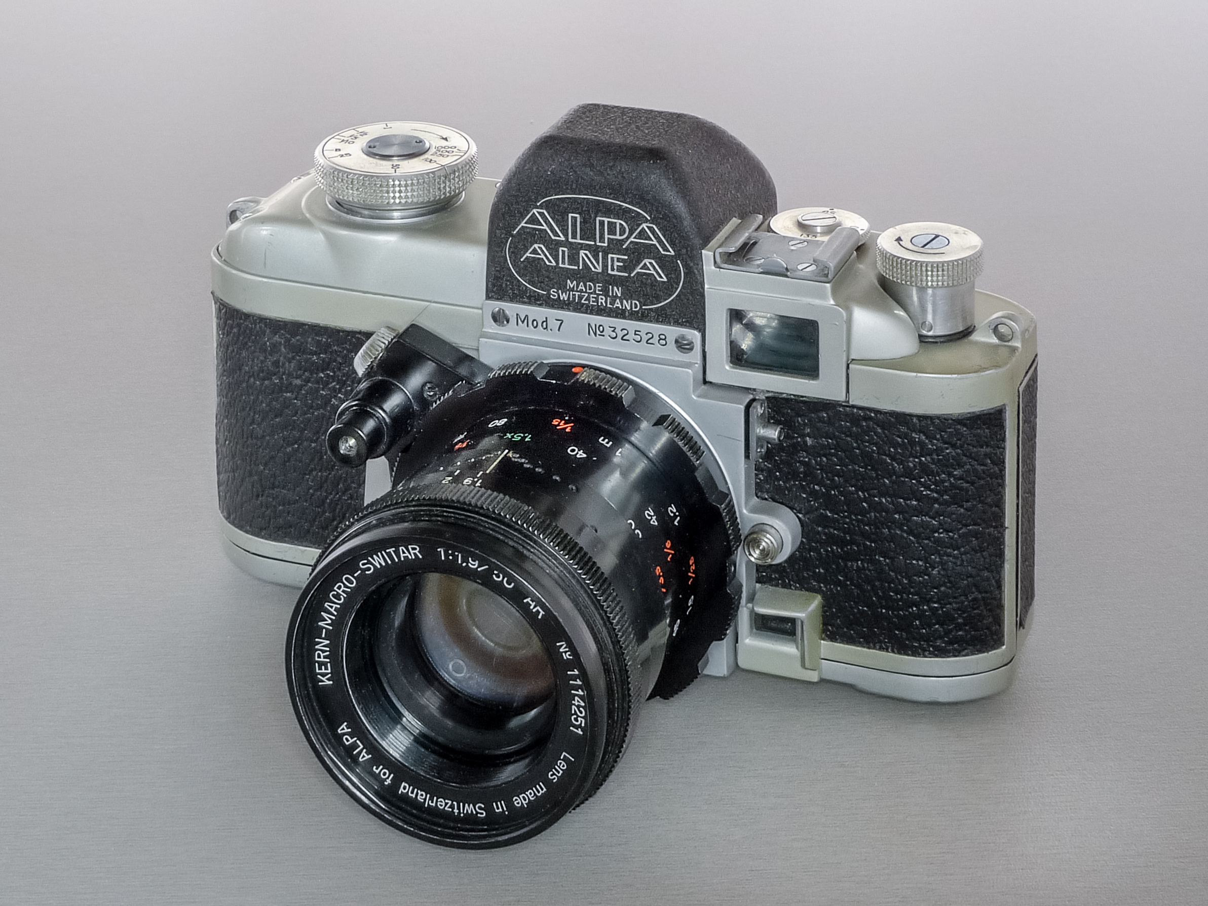 Alpa Alnea Modell 7 mit Kern Macro-Switar 1:1,9/50mm